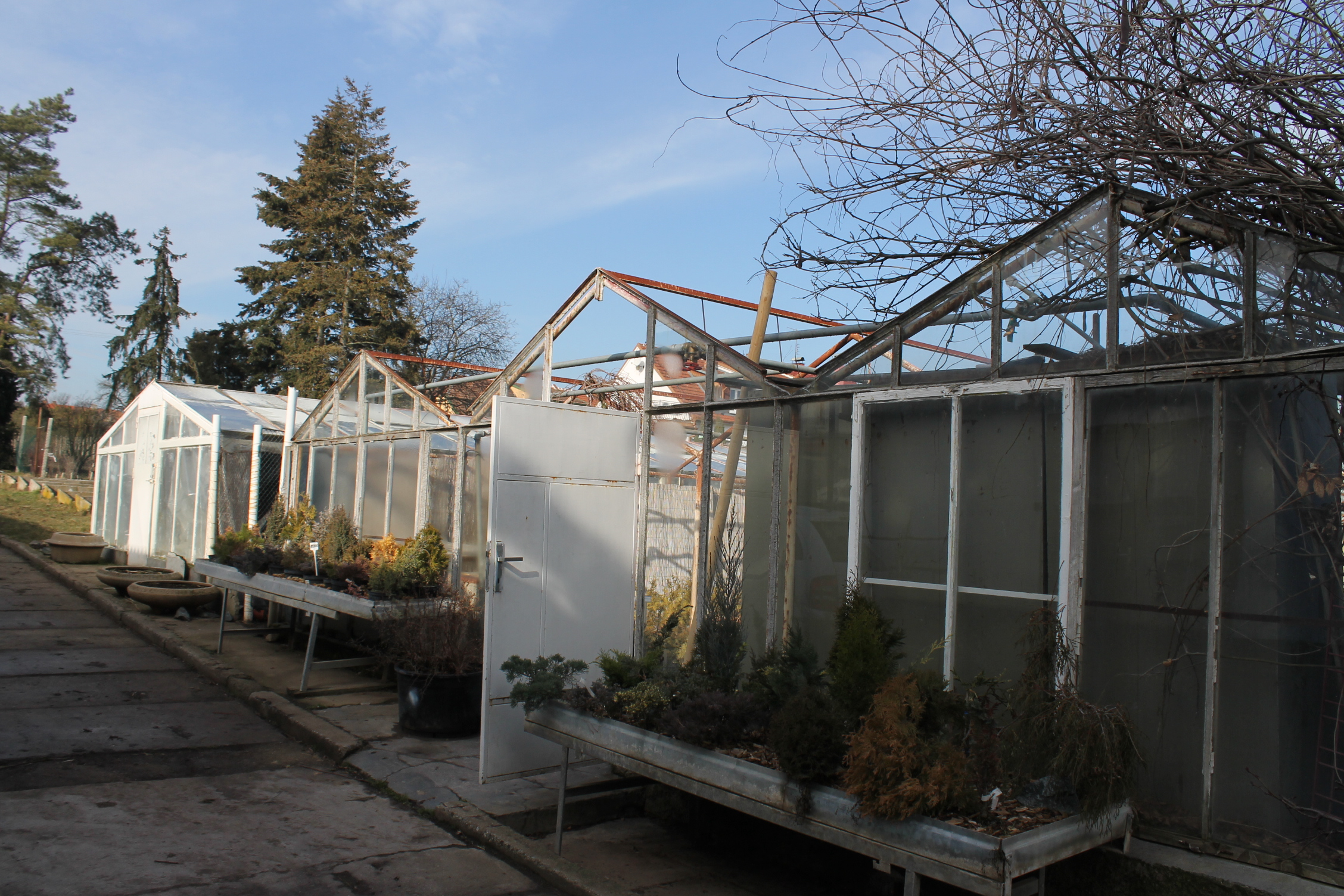 japan, oknový skleník, jih Moravy